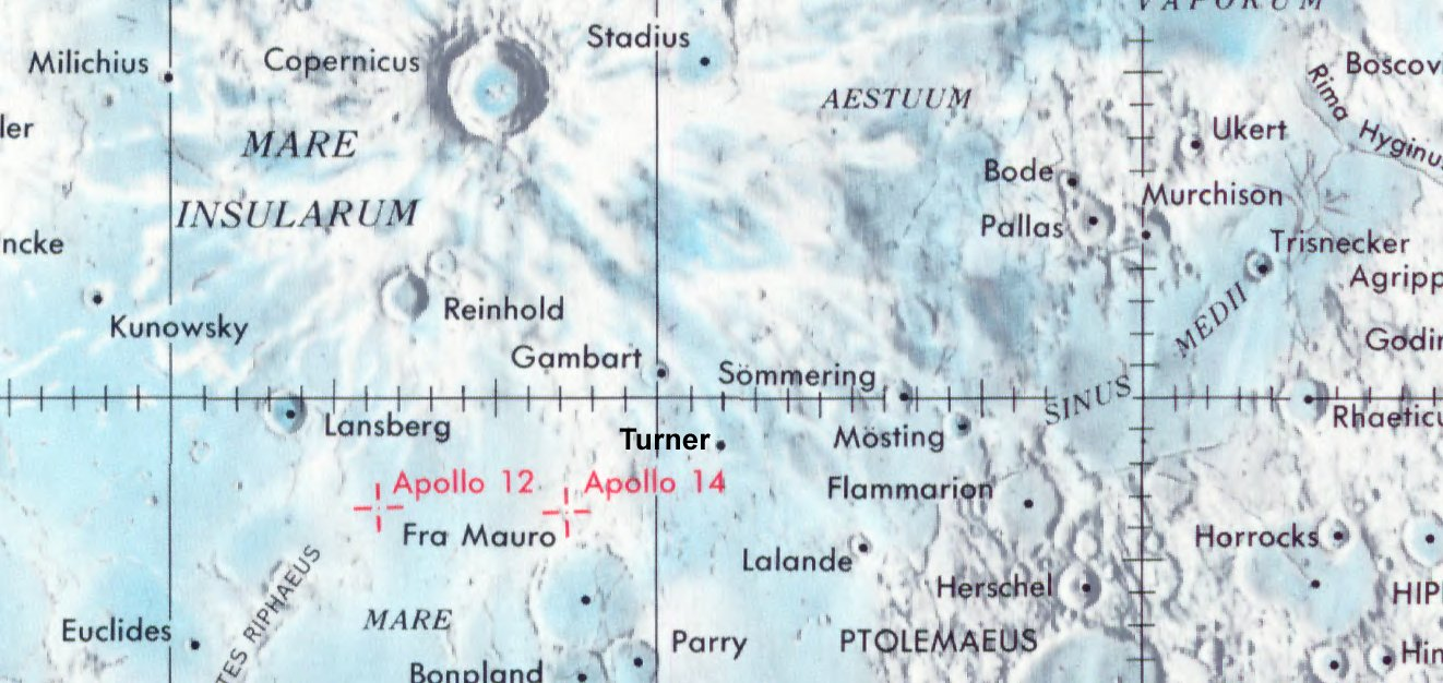 Cráter lunar . Localización. (Lunar Chart LPC1. Second Edition)